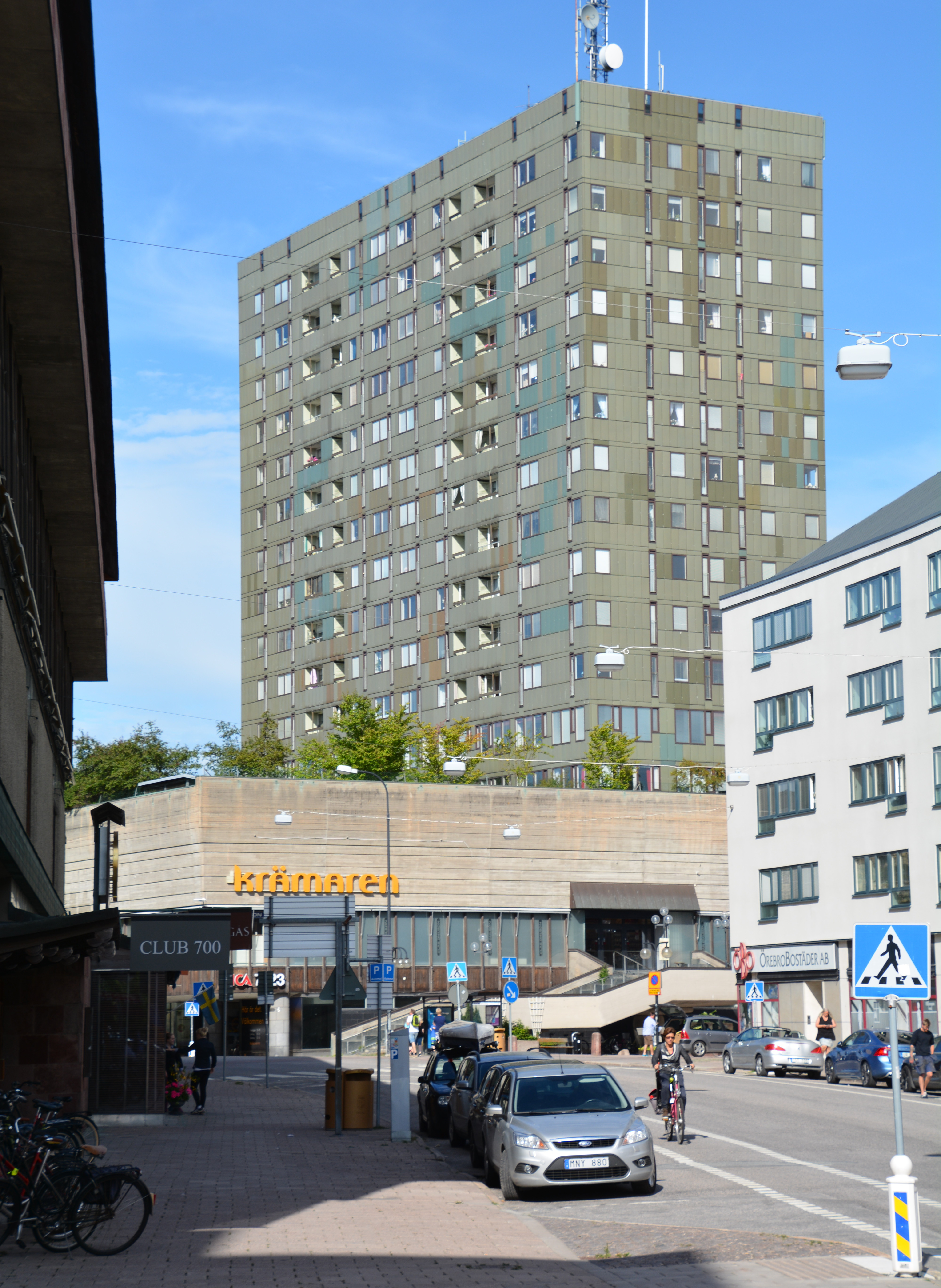 Krämaren i Örebro från söder